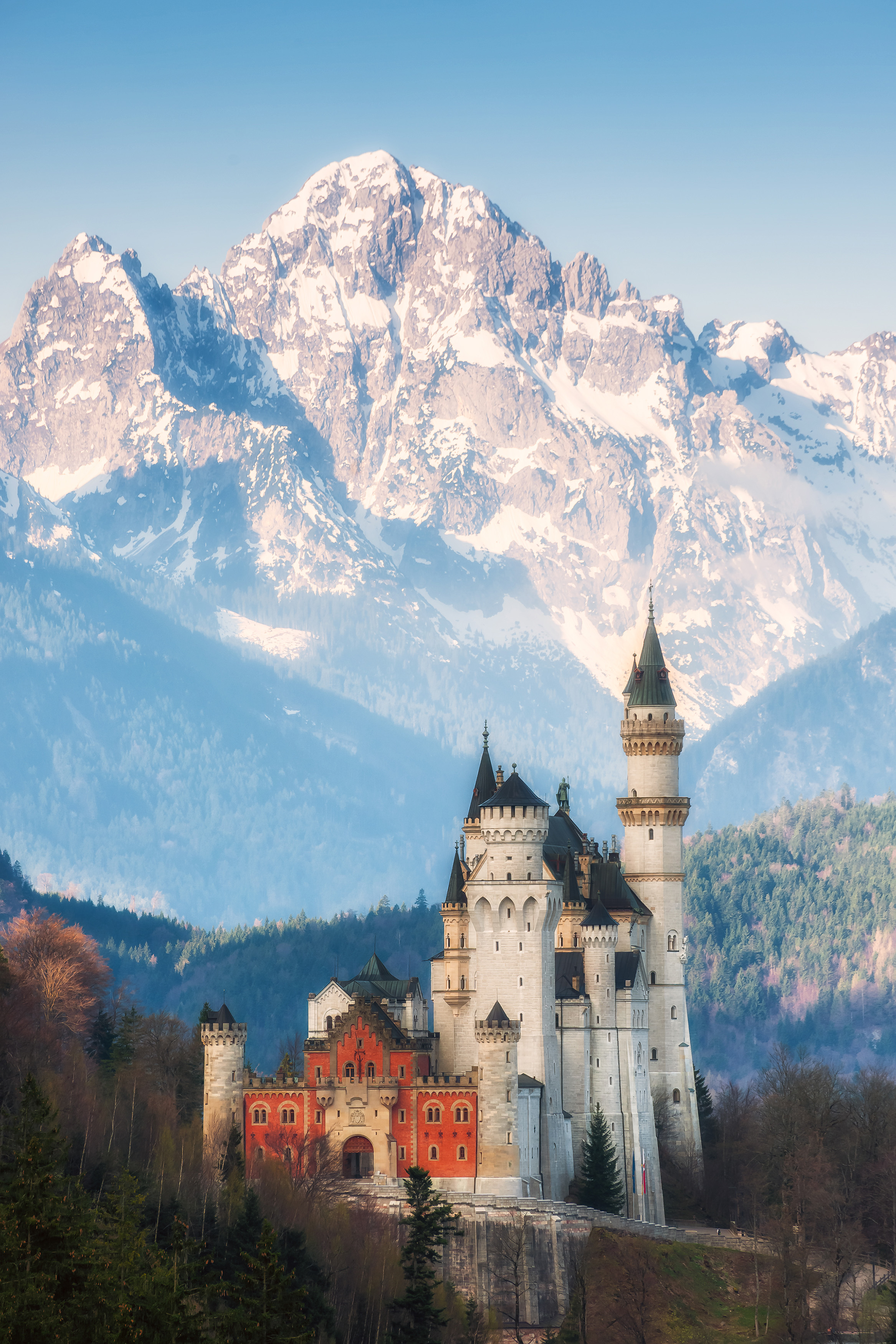 Schloss Neuschwanstein auf dem Hintergrund der Berge, Deutschland